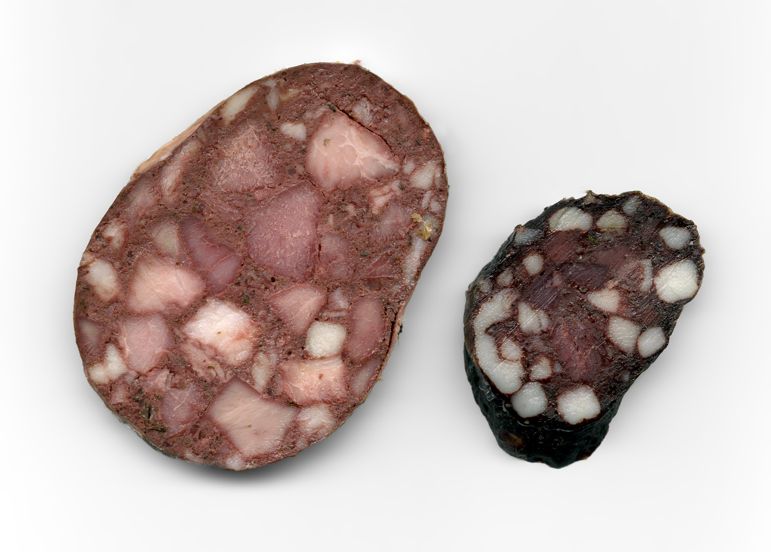 Krevní tlačenka Blutwurst.